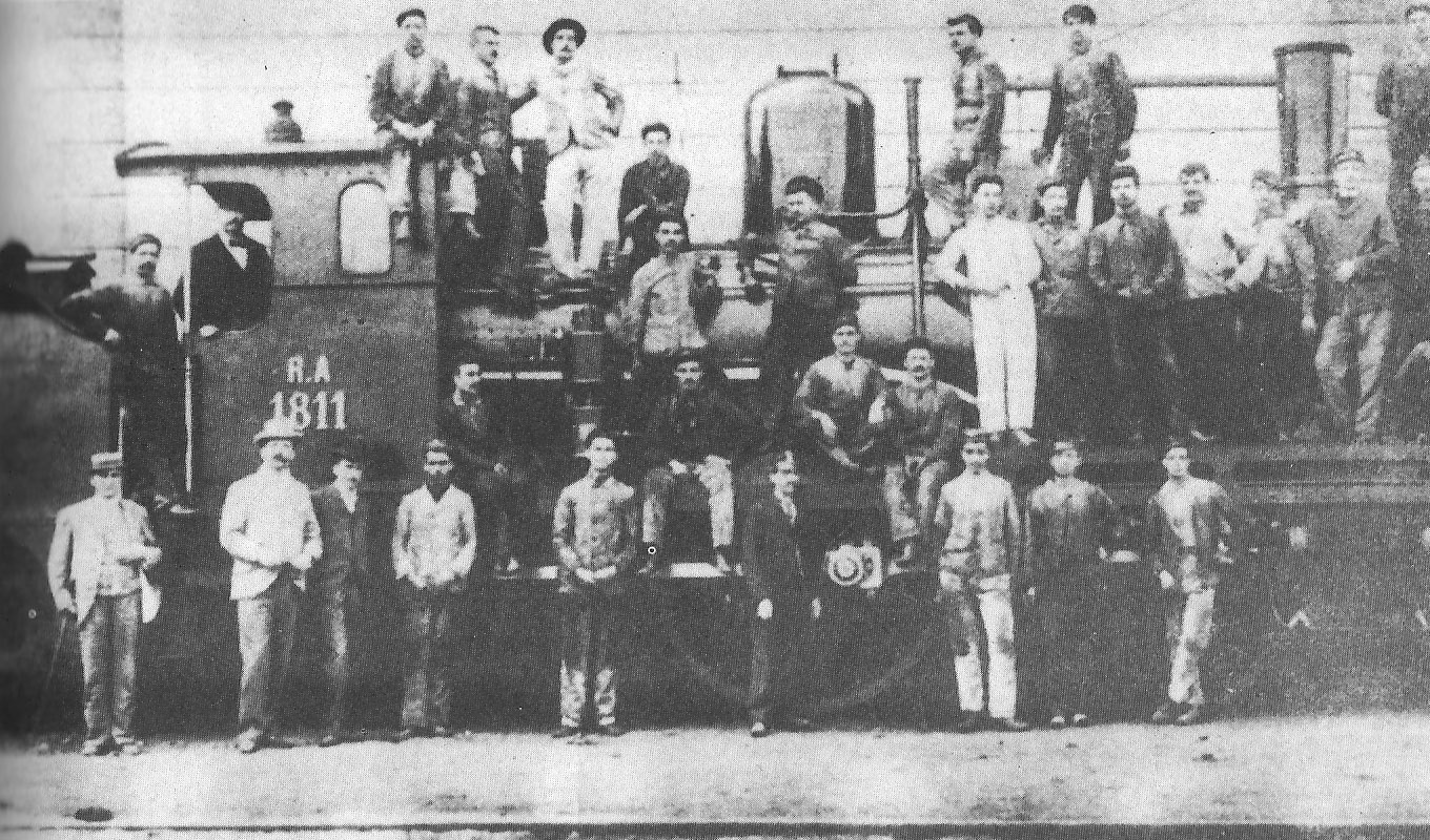 L'officina delle ferrovia di Verona a metà del 1800. Il più grosso esempio industriale di veronese dell'epoca che impegava quasi 300 operai.